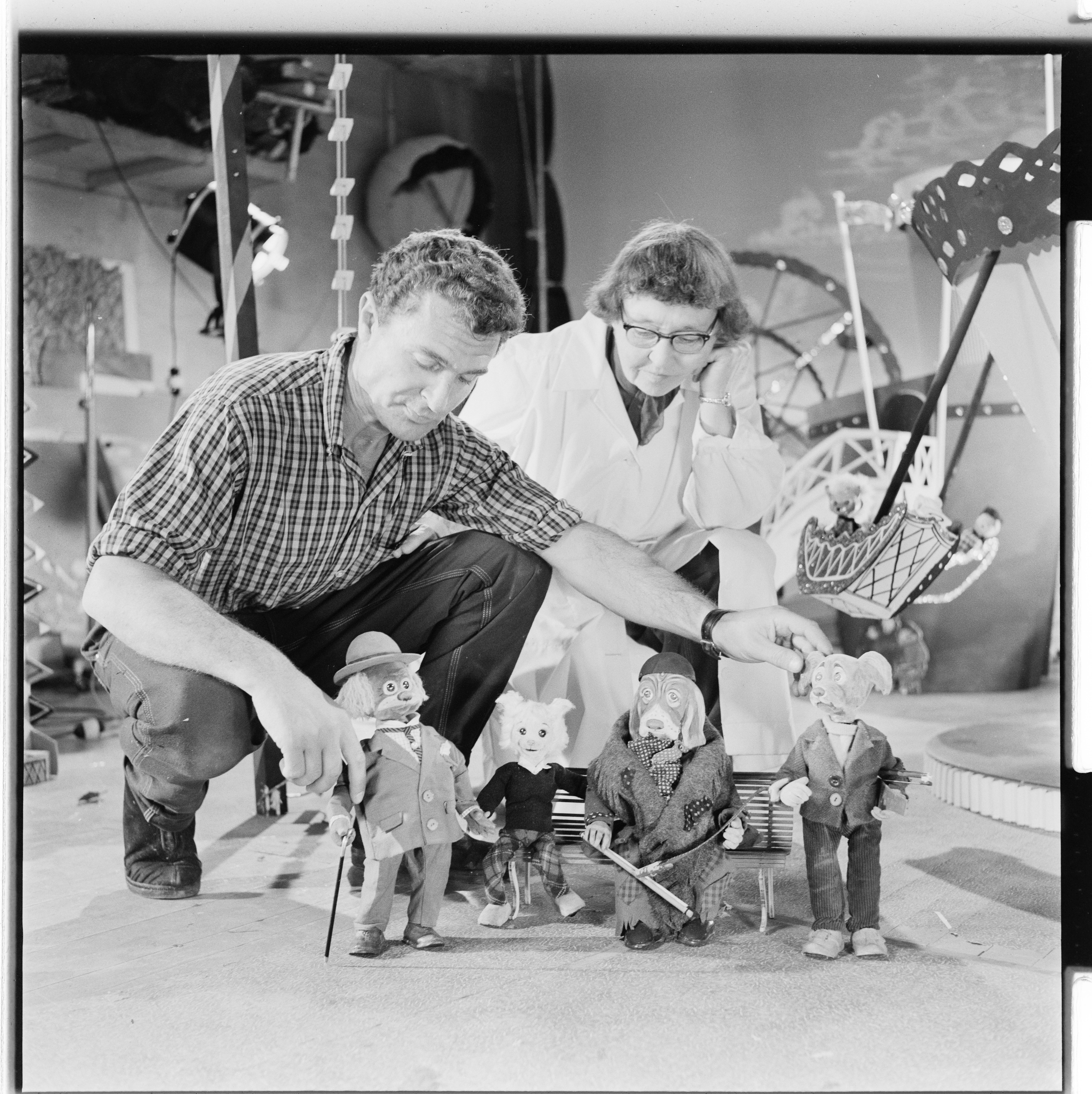 Bildet er hentet fra Arkivverket. Caprinofilm. NÅ nr.1, 1955 Arkivinstitusjon : Riksarkivet Arkivnavn : Billedbladet NÅ Sted : Norge, Ukjent, Ukjent, Ukjent Emneord: Rekvisitter, Dukkefilm, Menn, Kvinner, Innspilling Avbildet: Caprino, Ivo